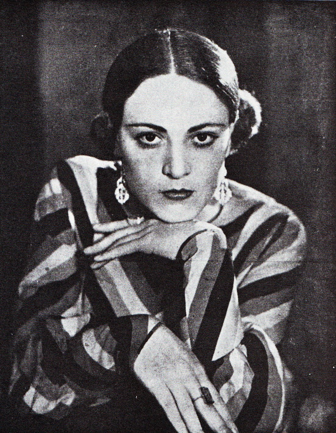 Die Afrikaanse toneelspeelster Lydia Lindeque.